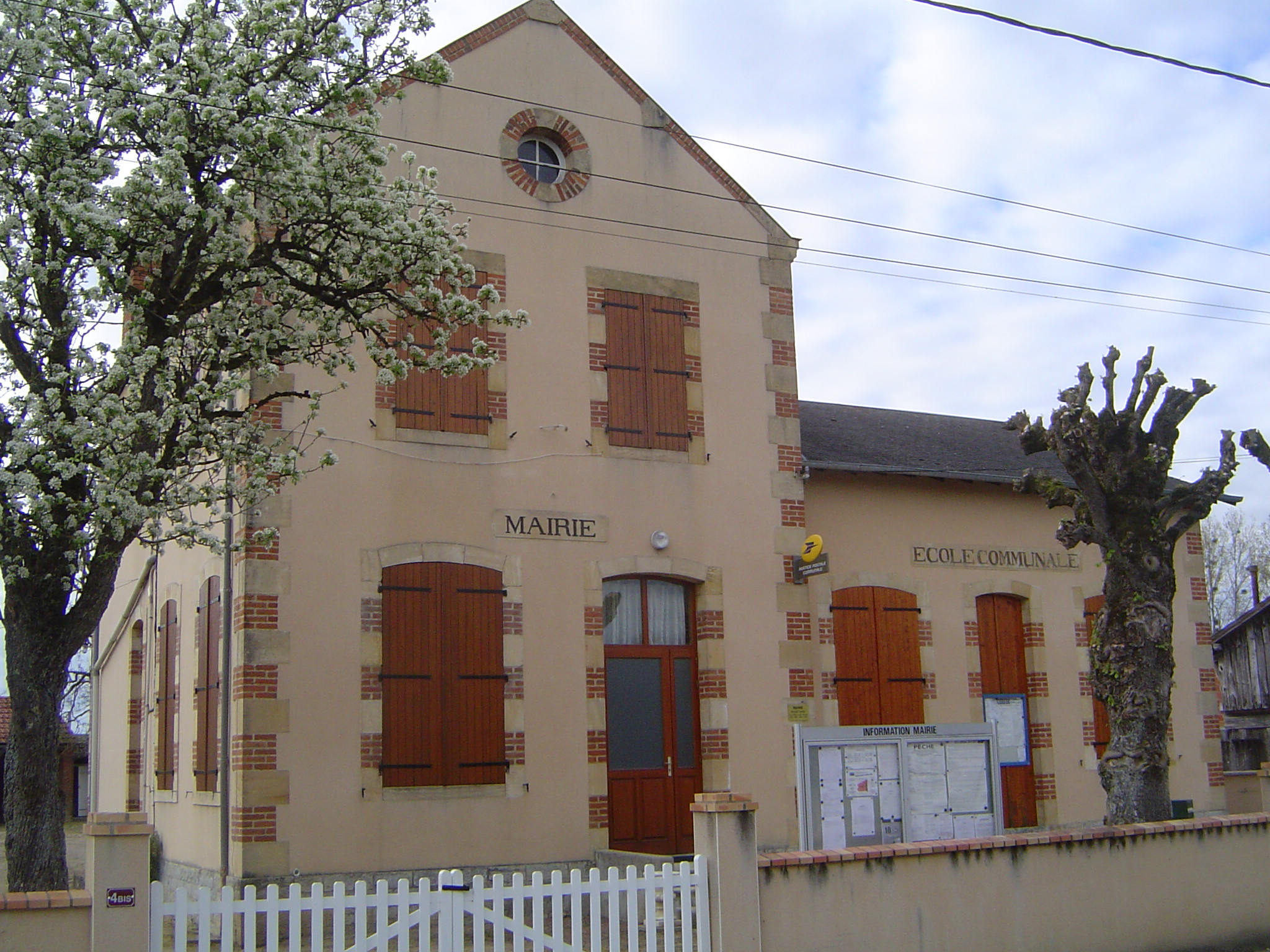 Saint-Hilaire-Fontaine (mairie école 1)